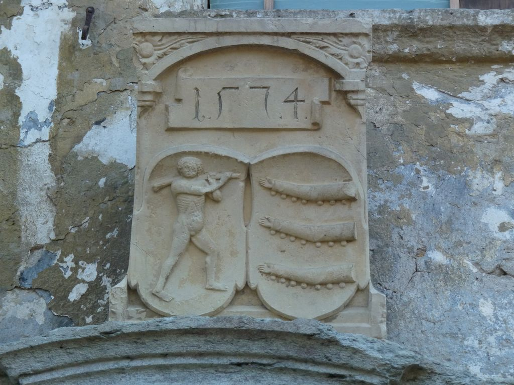 Šempetrska graščina v Stražišču - grb družine Siegesdorf